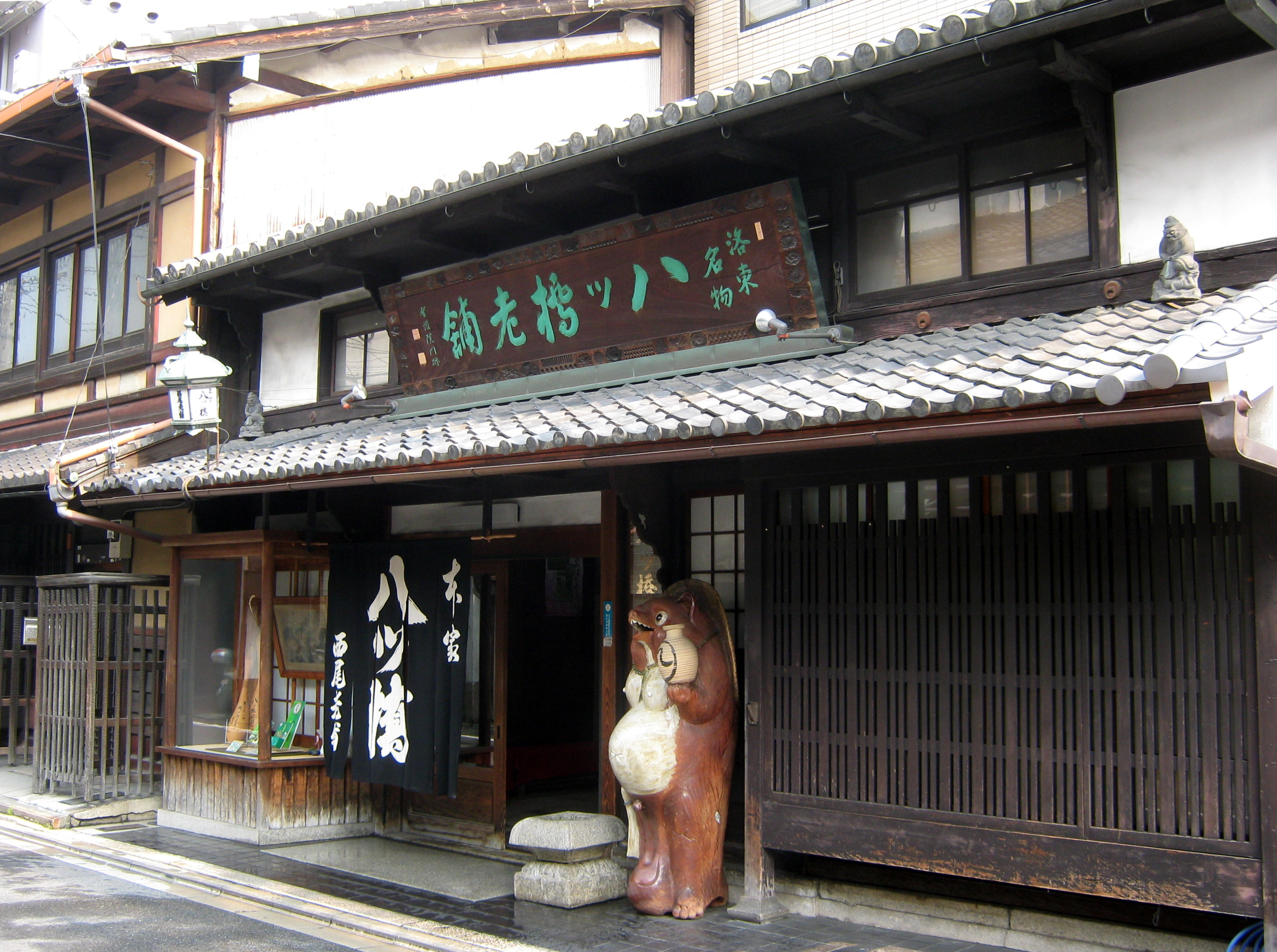 本家西尾八ッ橋。